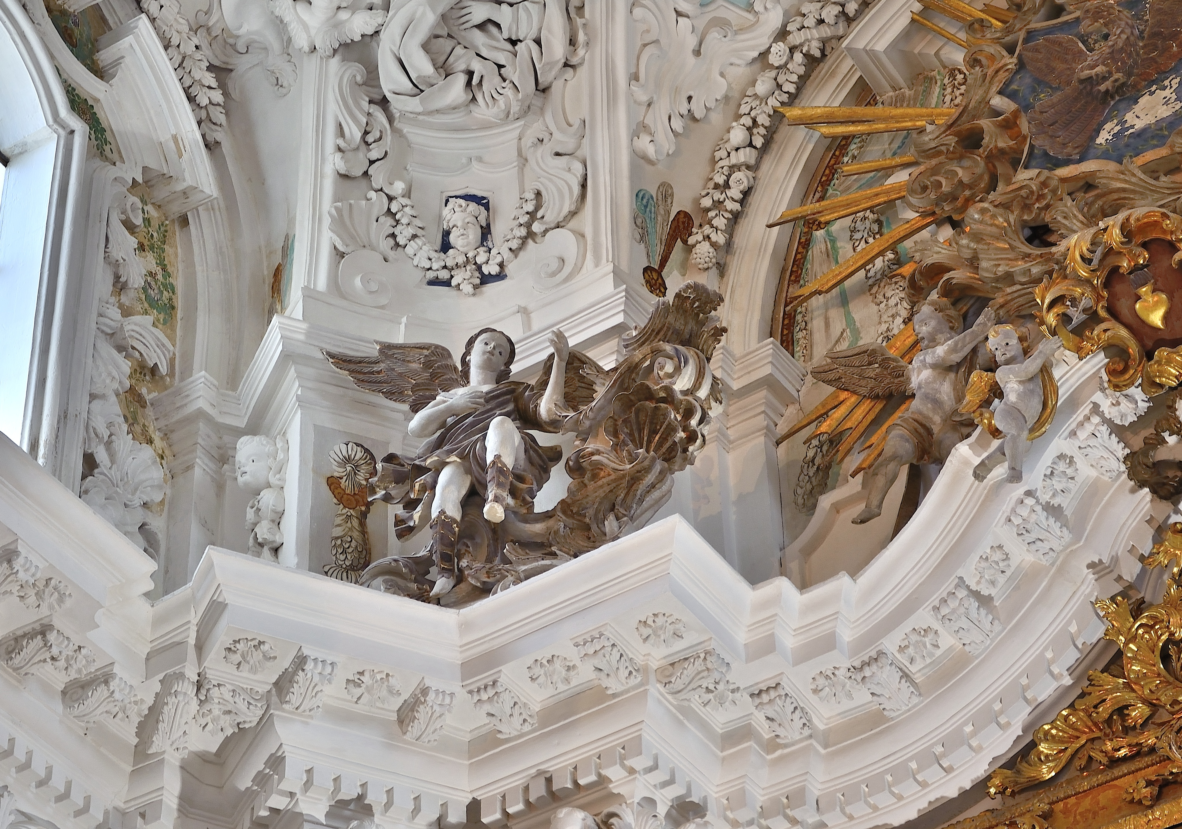 Chiesa di Santa Teresa (solo esterni) This is a photo of a monument which is part of cultural heritage of Italy.